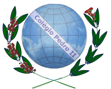 Logomarca do Colégio Pedro II